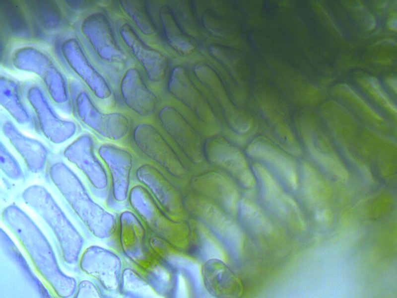 Haartragendes Frauenhaarmoos Polytrichum piliferum, Laminazellen, Vergrößerung: 400x, Rostock